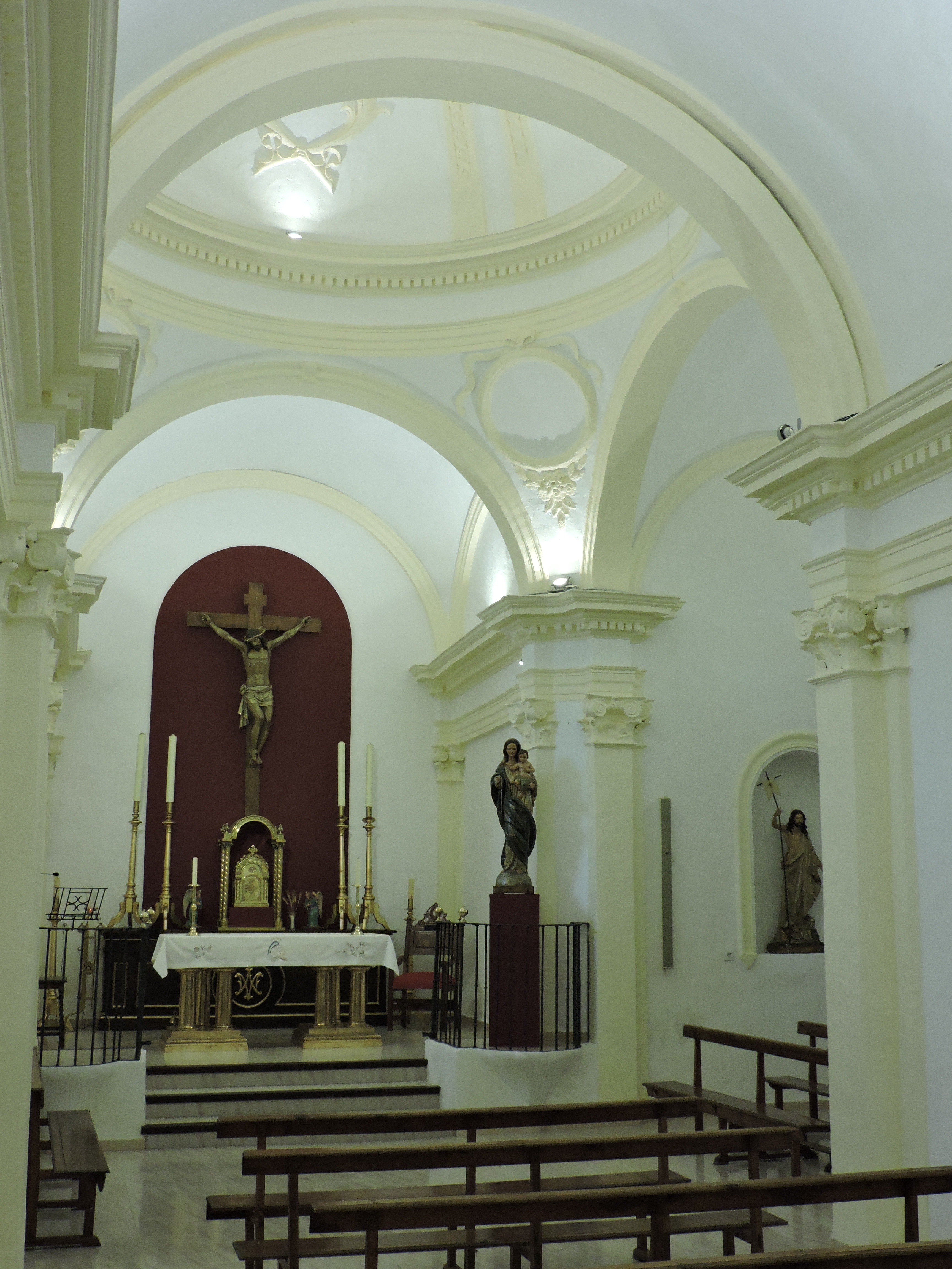 Interior de la Ermita de San Sebastián de Valdepeñas de Jaén. En el altar mayor, tabernáculo para el Santísimo Sacramento y Cristo Crucificado. En el púlpito de la epístola, imagen de la Virgen de las Mercedes. En la hornacina de la capilla lateral, imagen de Cristo Resucitado.